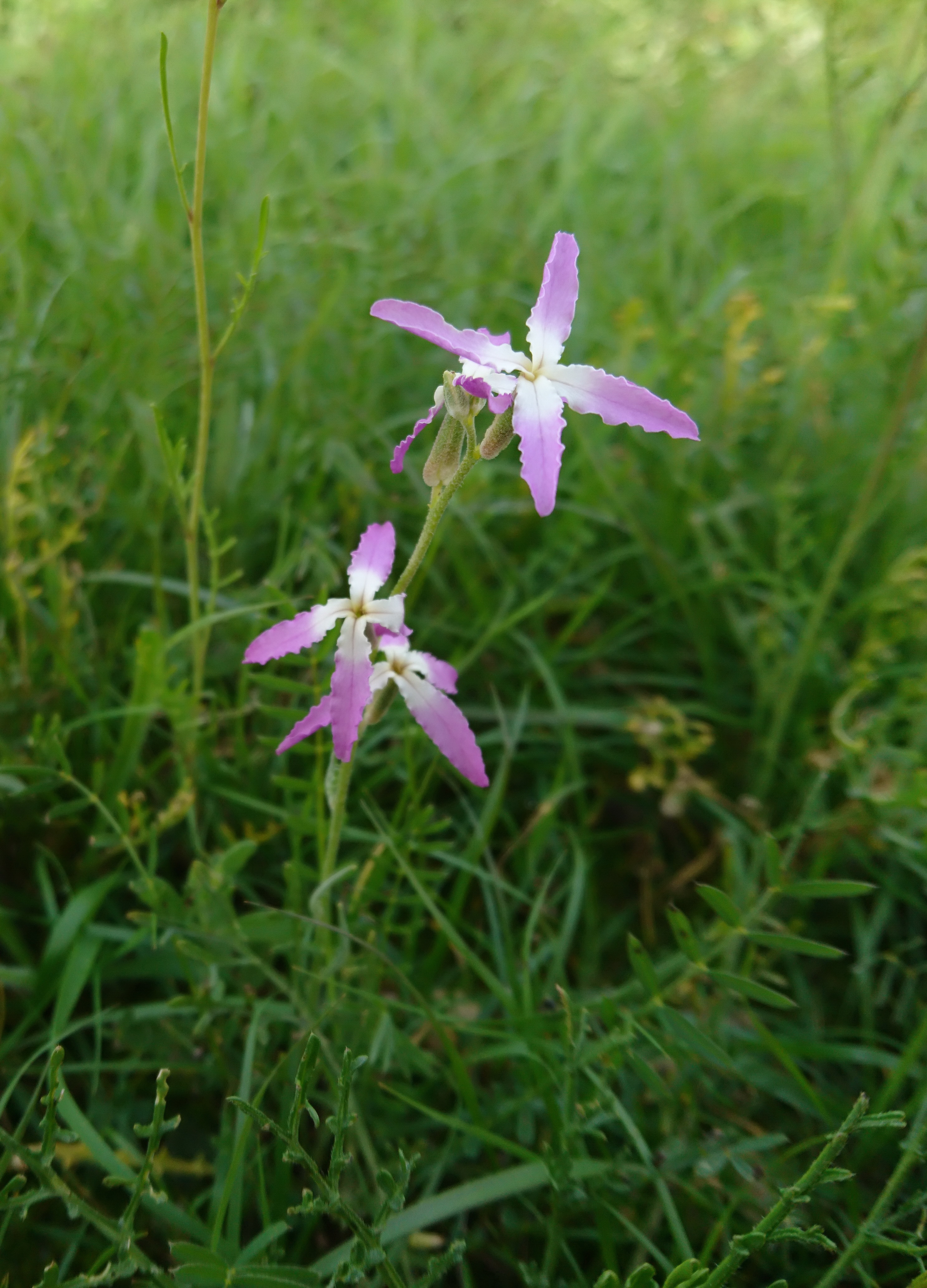 شب‌بوی خودرو، بهبهان